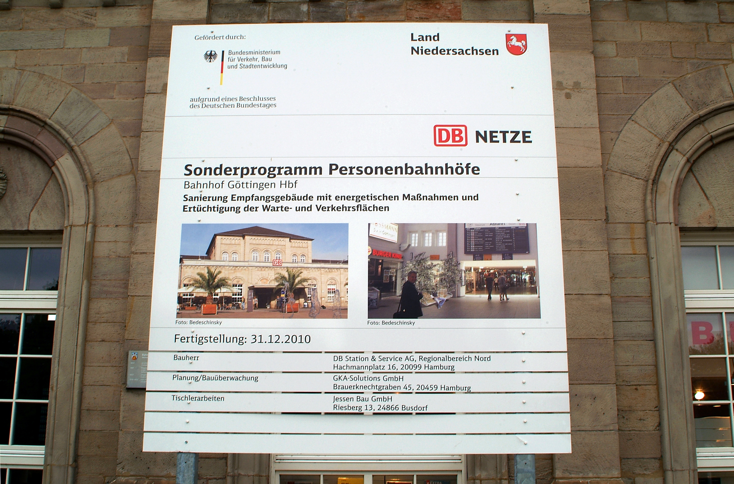 Infotafel "Land Niedersachsen, DB Netze, Sonderprogramm Personenbahnhöfe, Bahnhof Göttingen Hbf, Sanierung Empfangsgebäude mit energetischen Maßnahmen und Ertüchtigung der Warte- und Verkehrsflächen", wobei die "Fertigstellung [zum] 31. 21. 2010" geplant war. Gefördert wurde die Maßnahme durch das Bundesministerium für Verkehr, Bau und Stadtentwicklung "aufgrund eines Beschlusses des Deutschen Bundestages.